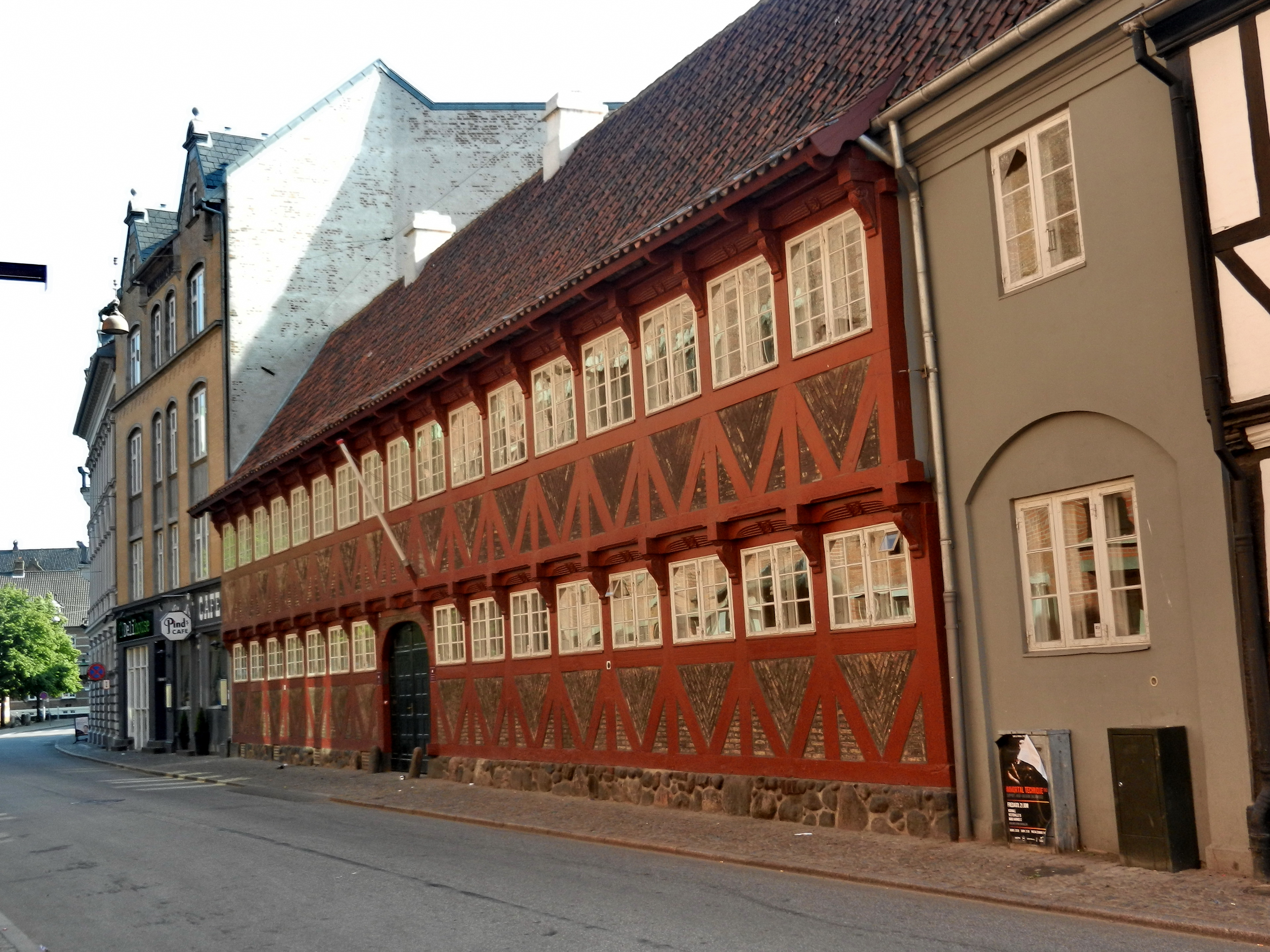 Aarhus